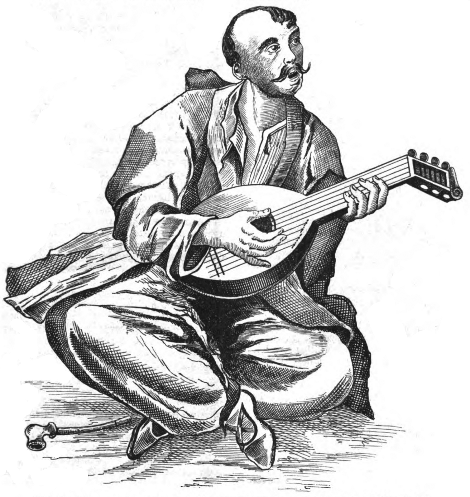 Козак-бандурист [з Рігельмана: „Лѣтописное повѣствованіе о Малой Руси" (1785 — 1786)]. Зоря, 1894, 01, с. 18